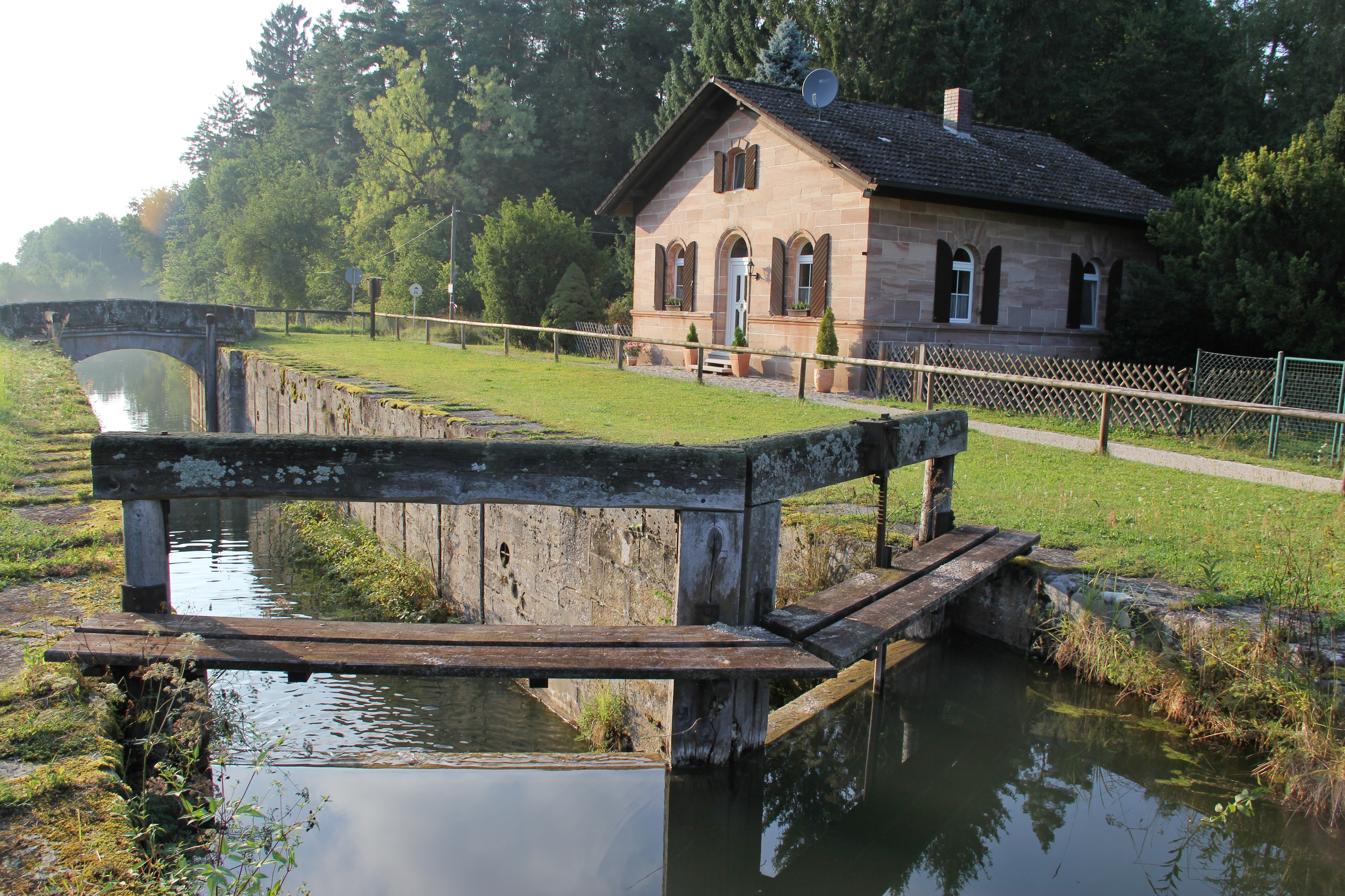 Ludwig-Donau-Main-Kanal, Schleuse 58